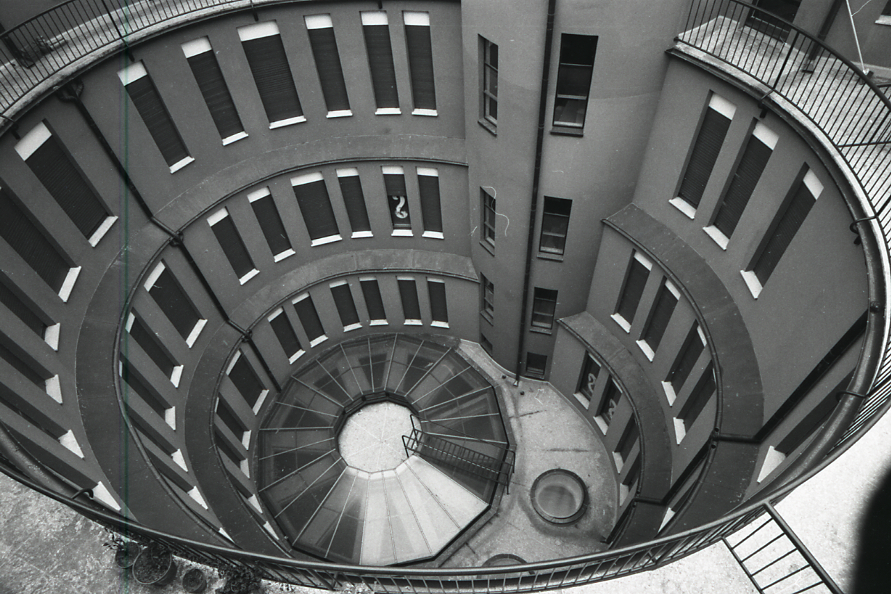 Servizio fotografico : Milano, 1965 / Paolo Monti. - Strisce: 3, Fotogrammi complessivi: 18 : Negativo b/n, gelatina bromuro d'argento/ pellicola ; 35 mm. - ((I fotogrammi hanno una doppia numerazione. - Sul portanegativi: Leica IF AGFA. - Occasione: Pubblicazione